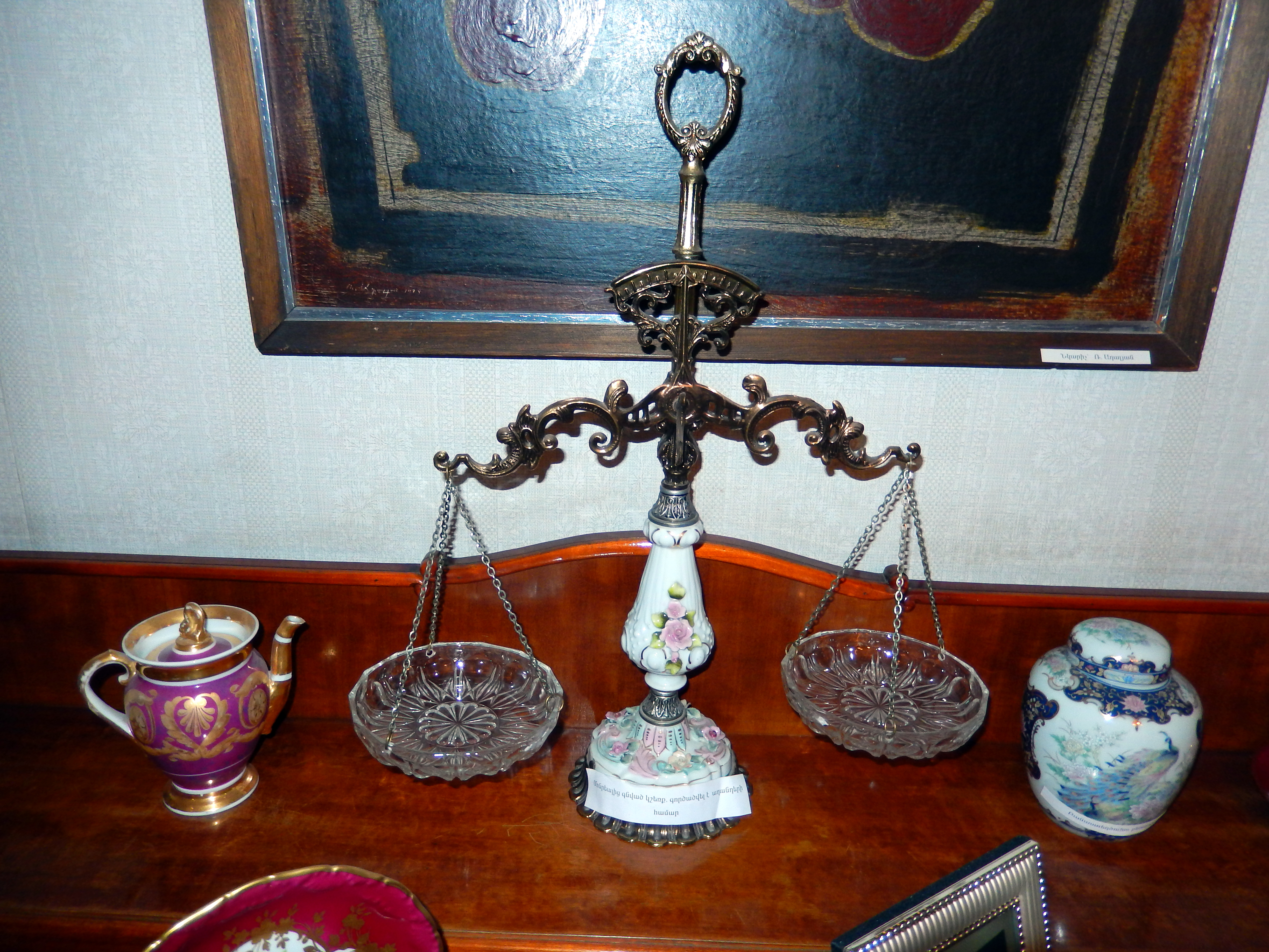 Սիլվա Կապուտիկյանի տուն թանգարան